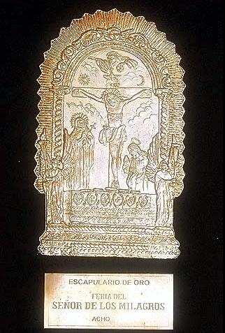 Escapulario de Oro de la Feria Taurina del Señor de los Milagros